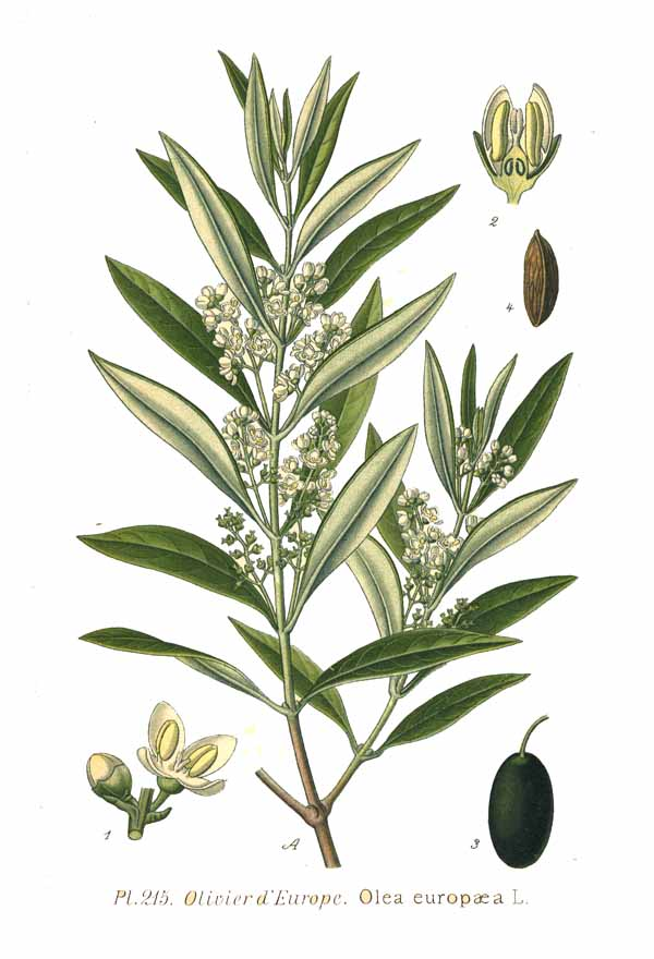 Olea europaea L.